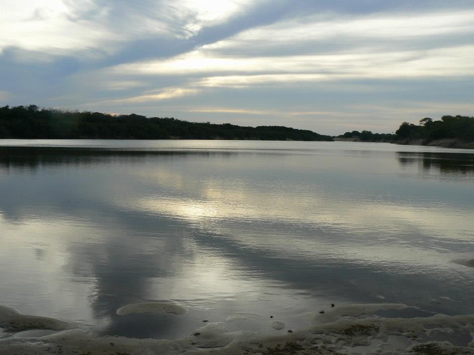 Río Capanaparo - estado Apure - Venezuela 2007